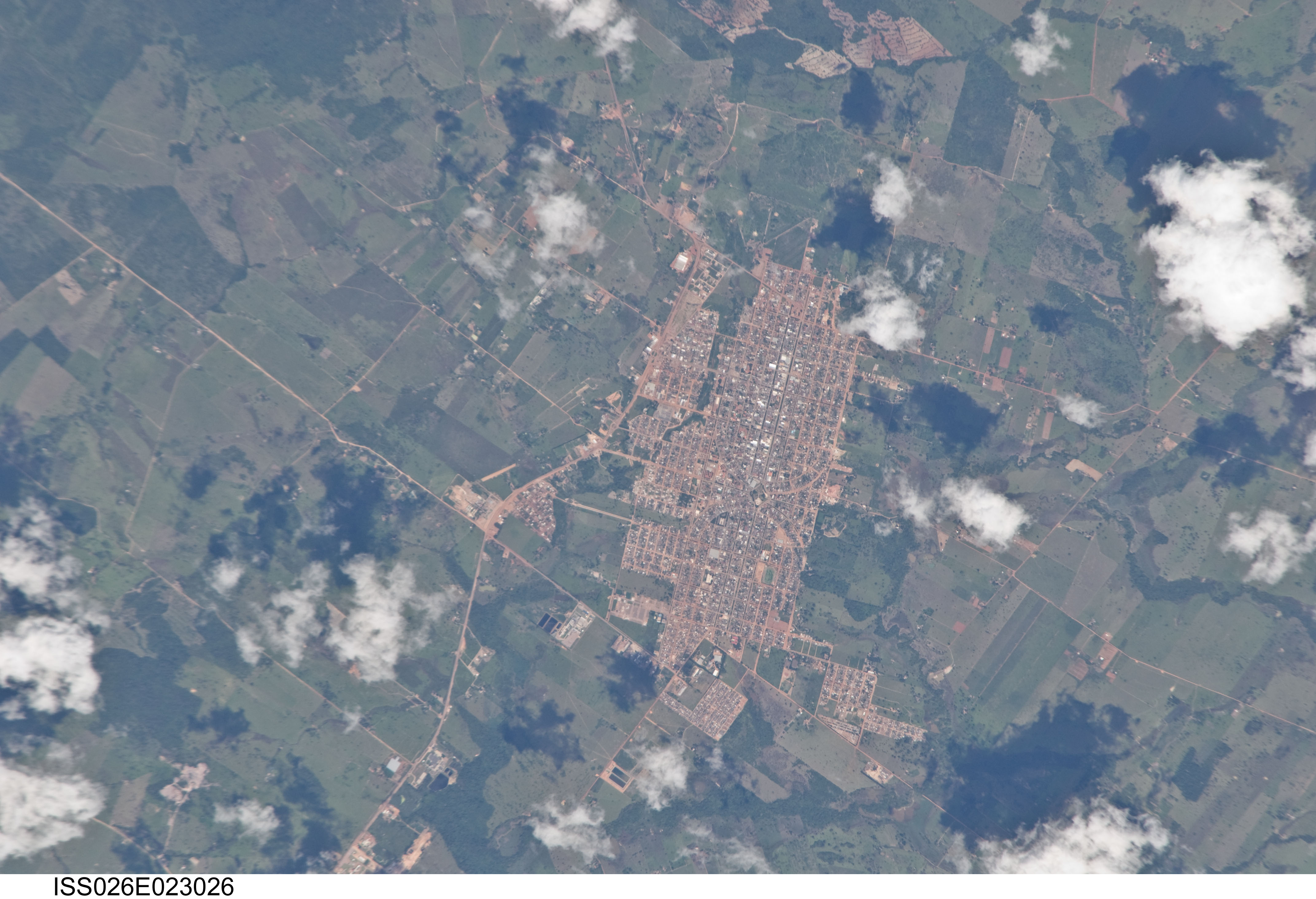 Vista da Estação Espacial Internacional da cidade de Alta Floresta.